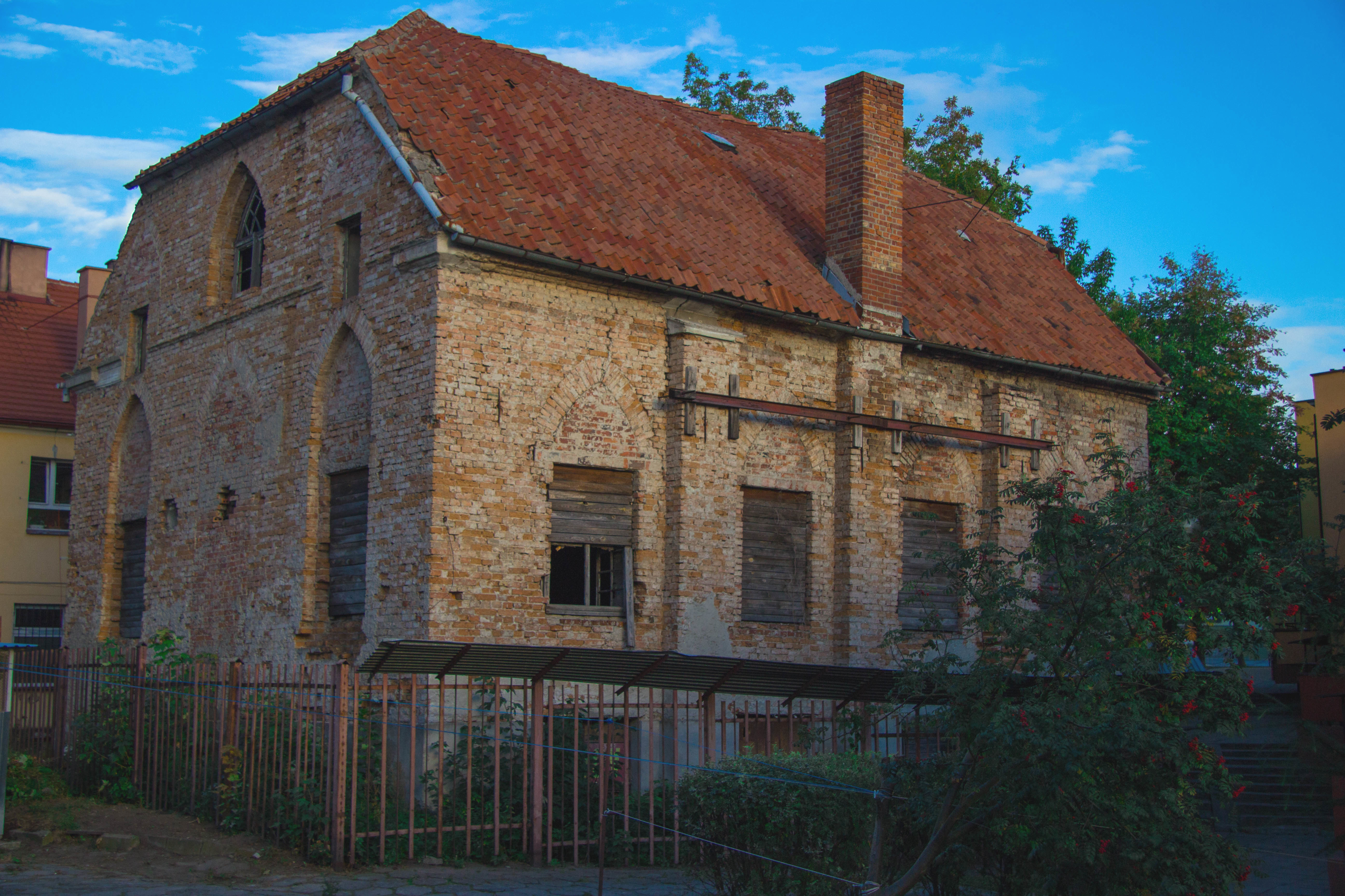 Synagoga w Kwidzynie powstała w 1832r. Po wybudowaniu nowej była udostępniona osobom prywatnym.